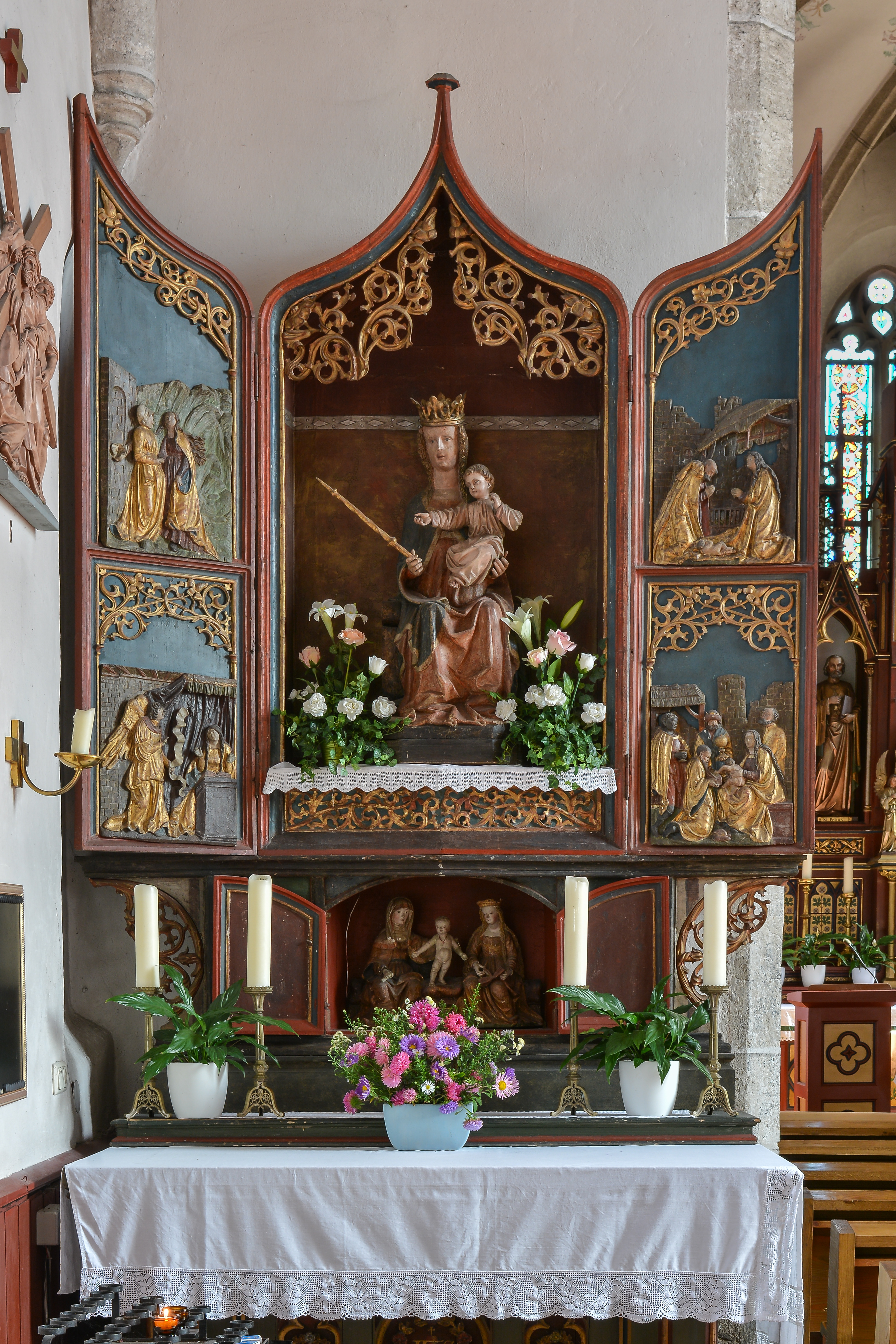 Der linke Seitenaltar in der kath. Pfarrkirche in Schleißheim (Oberösterreich) zeigt im Schrein eine sitzende Maria und im Staffelschrein die Gruppe "Hl. Anna selbdritt".